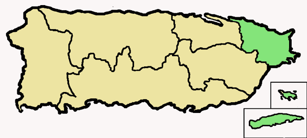 Mappa della diocesi cattolica di Fajardo-Humacao, a Puerto Rico. Anno 2009.